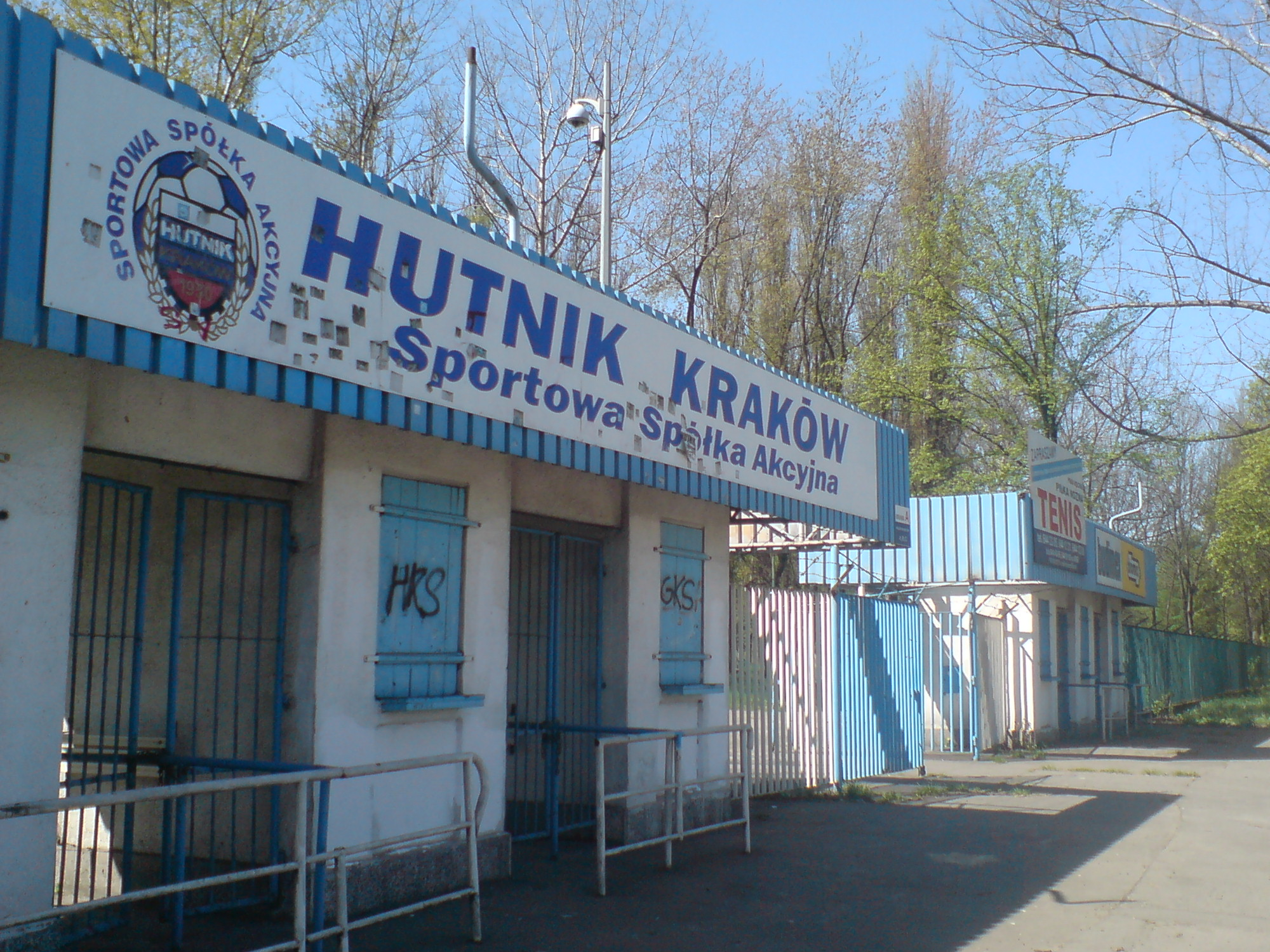 Stadion Hutnika Kraków - brama